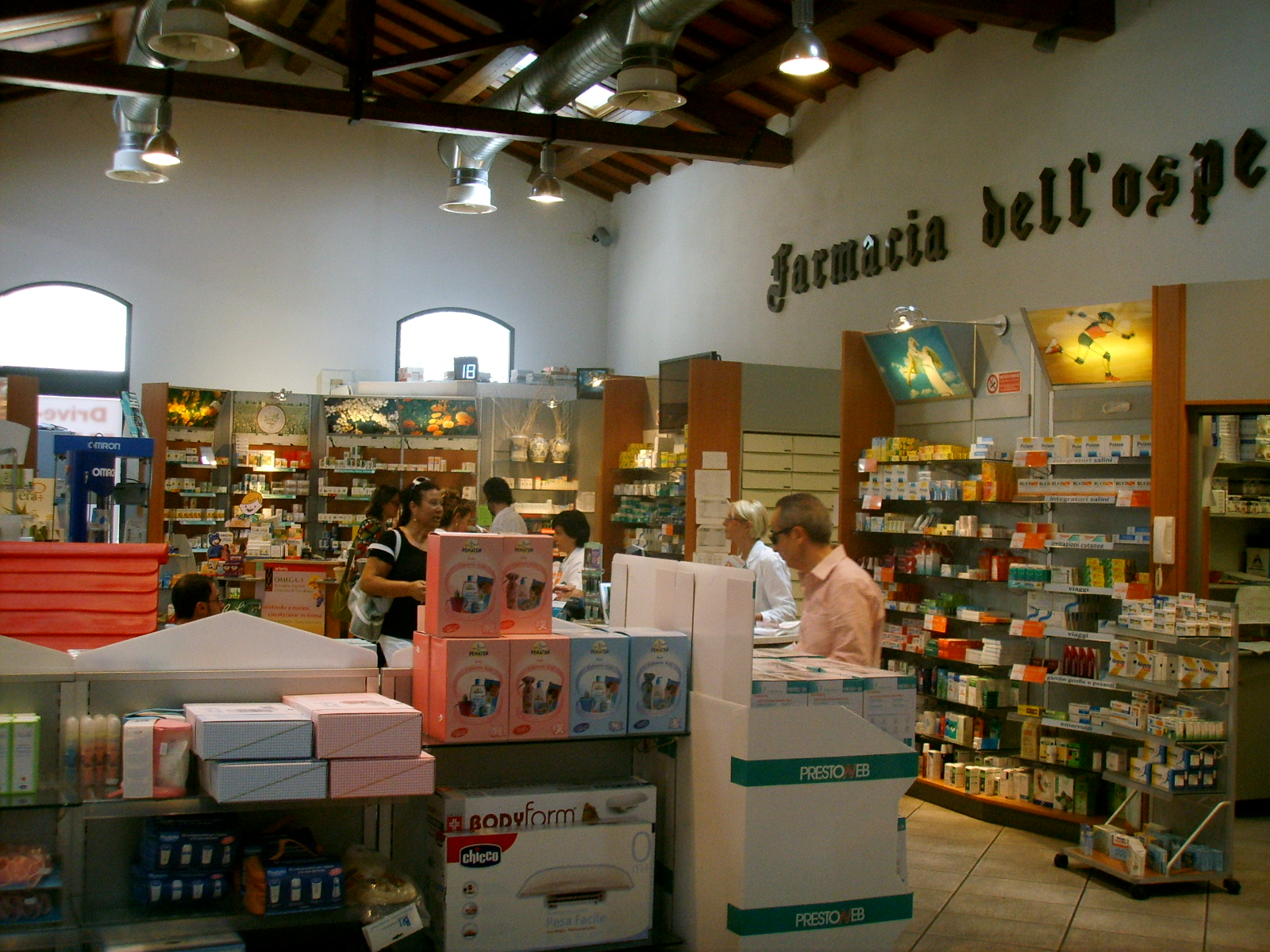 Farmacia di prato